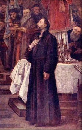 Česky: Václav Brožík - Jan Hus souzen na sněmu Kostnickém r. 1415